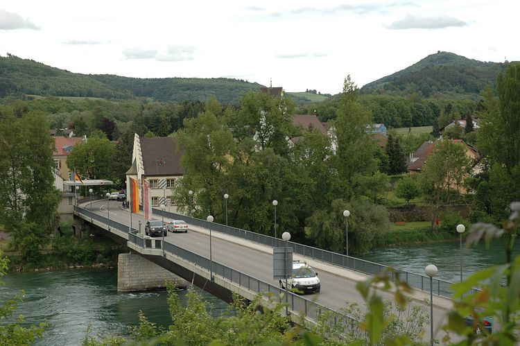 Die Rheinbrücke von Zurzach aus mit Blick auf Rheinheim im Mai 2013